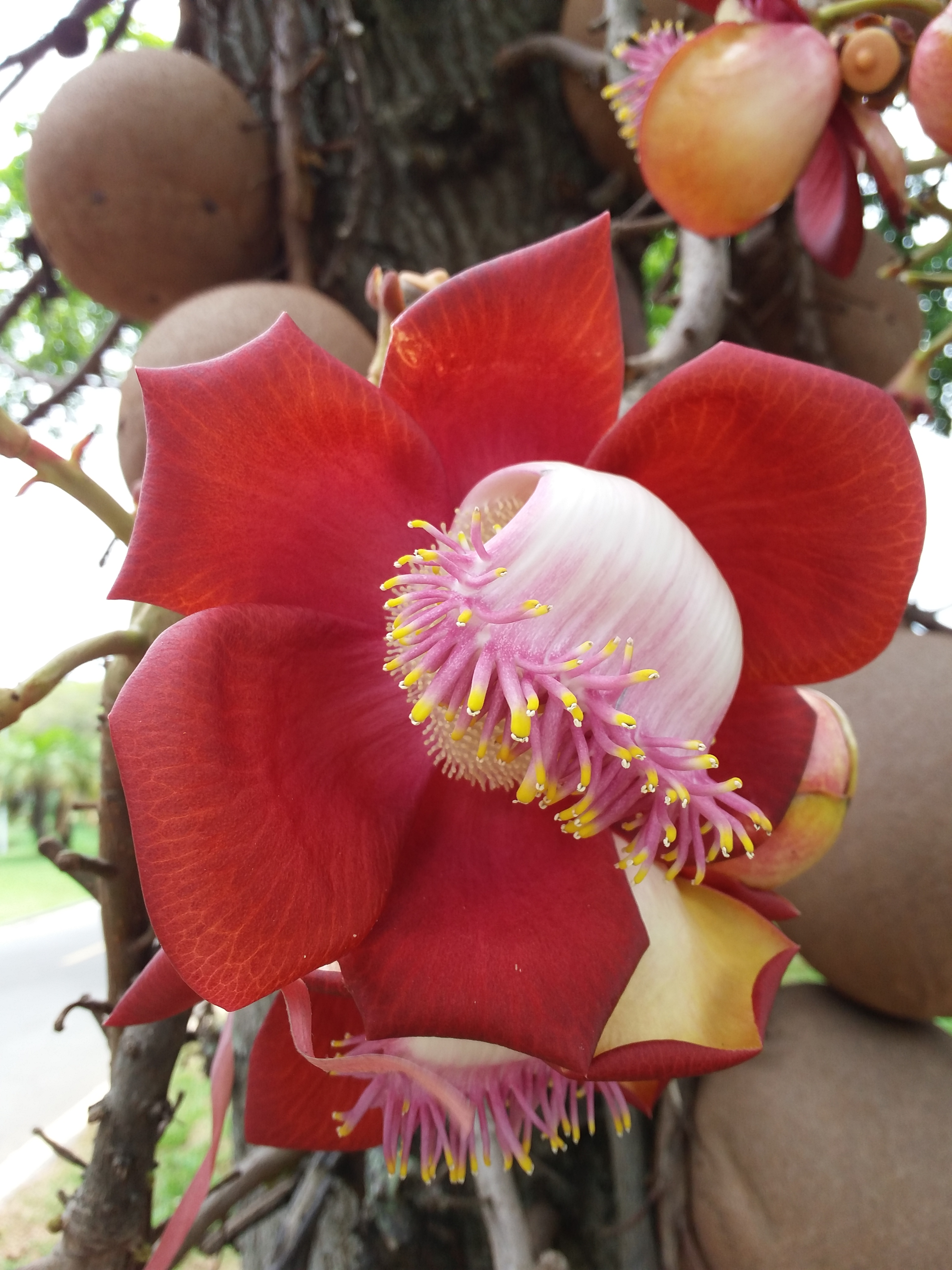 Flores grandes e cheirosas